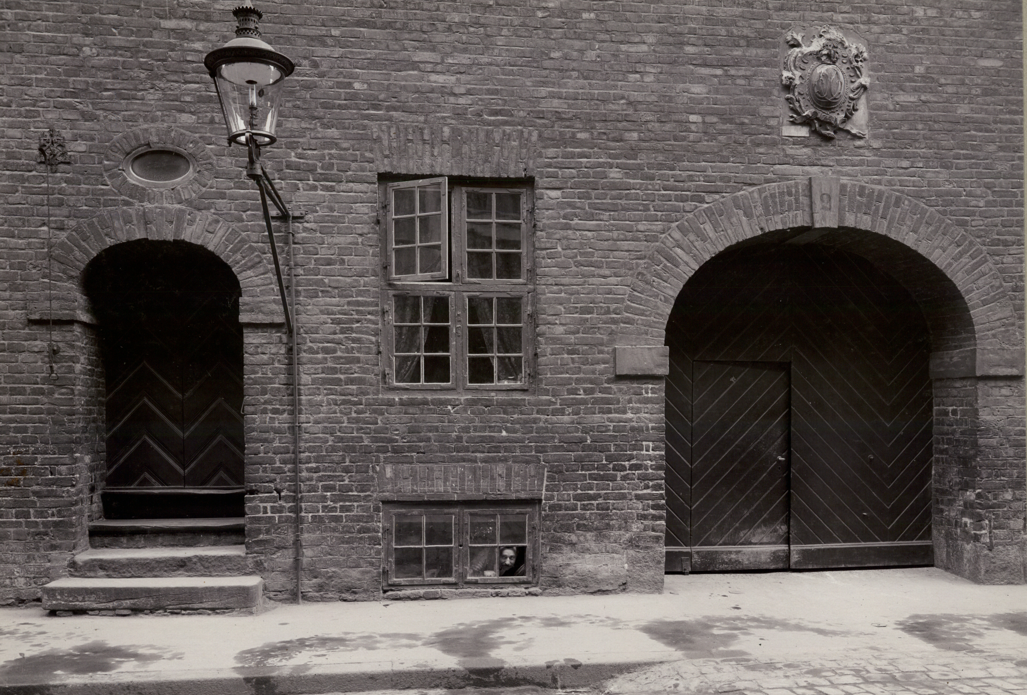 Indgang til Regensen.